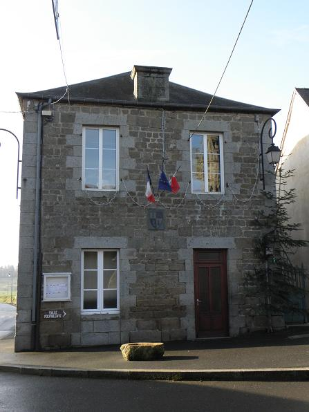 Ancienne mairie de Monthault (35).